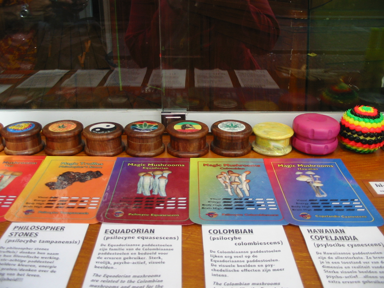 Paddo_products_Warmoesstraat_Amsterdam